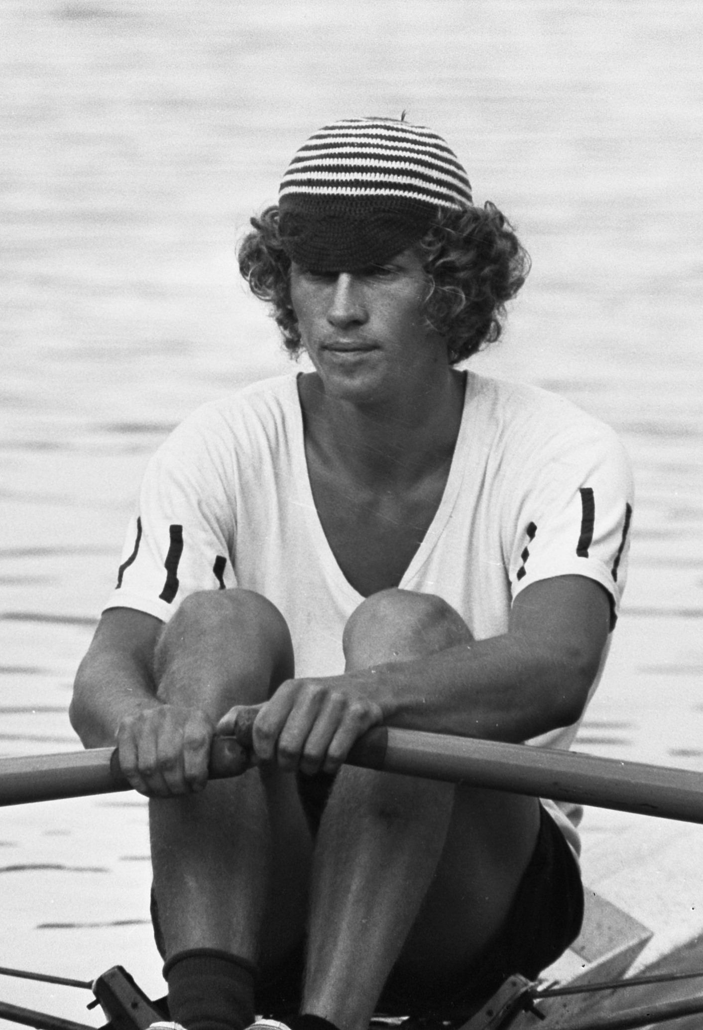 Nationale roeikampioenschappen 1975 op de Bosbaan, tweede dag